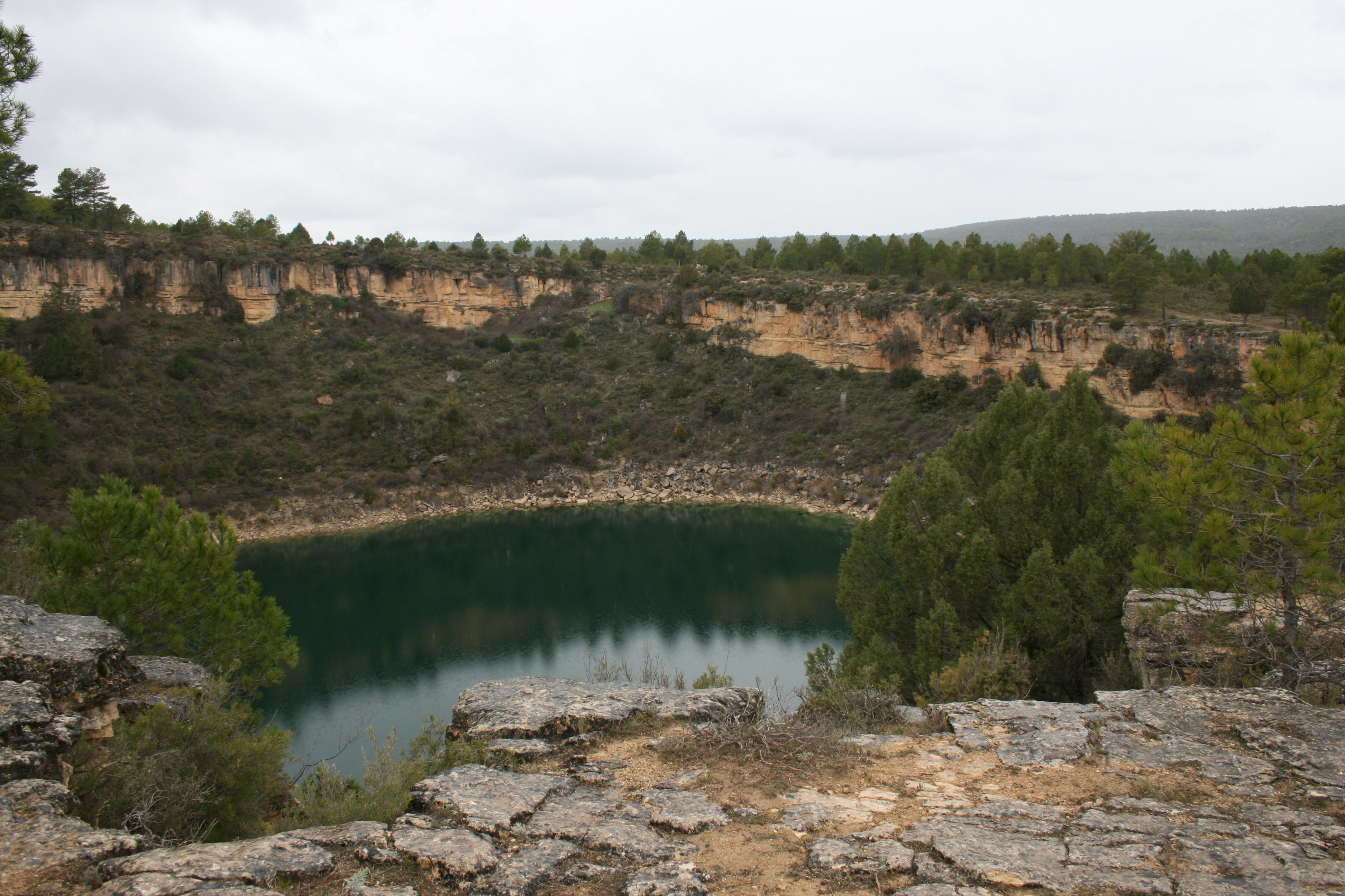 Torcas de Palancares This is a photography of a Site of Community Importance in Spain with the ID: ES4230014. Natura2000 entry, EEA entry